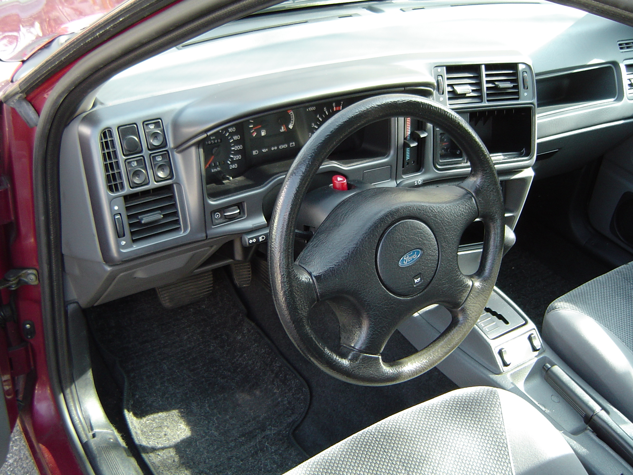 Ford Sierra CLX Swiss version inside